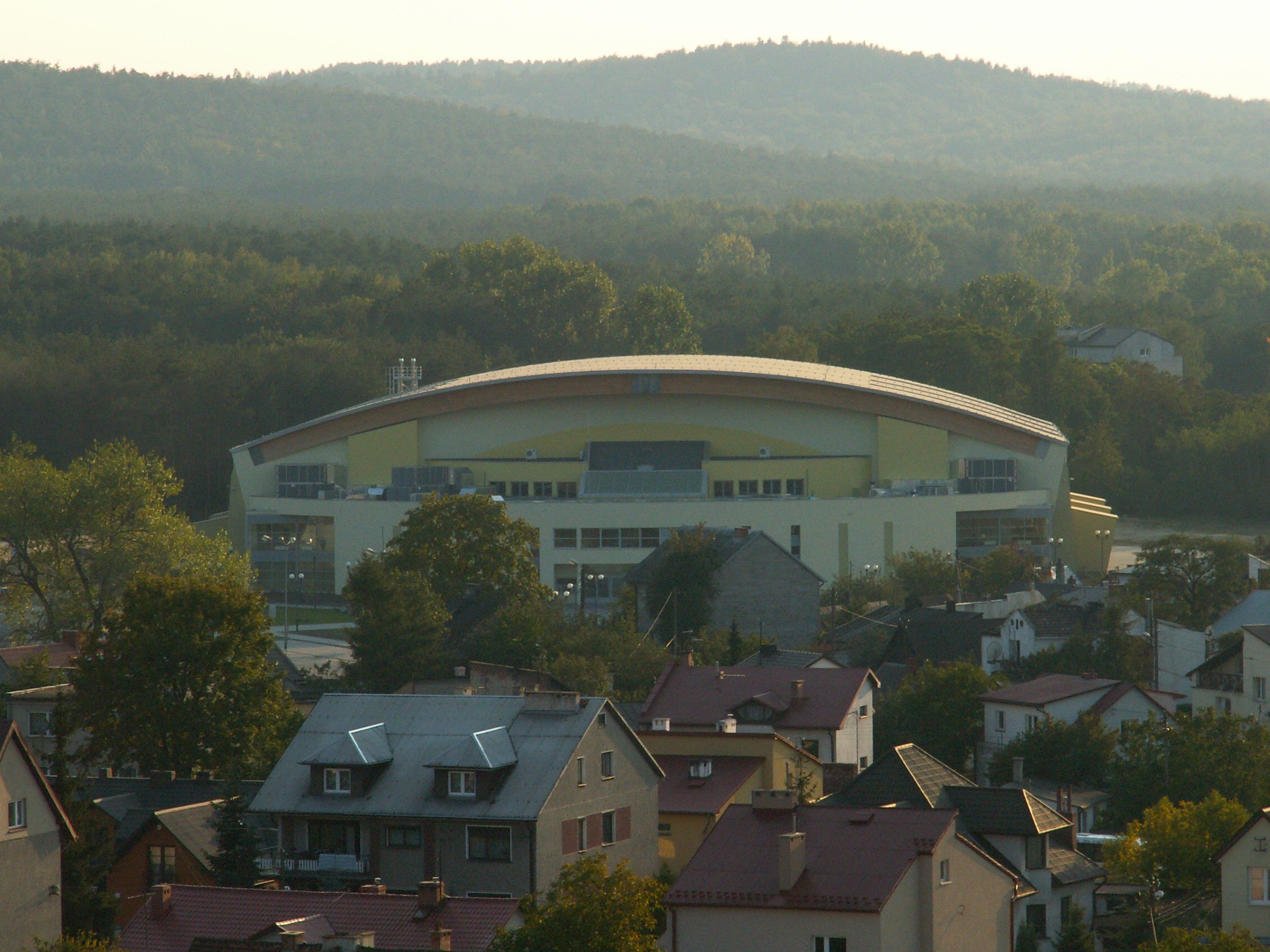 Hala Legionów w Kielcach. Sport hall in Kielce (Poland)